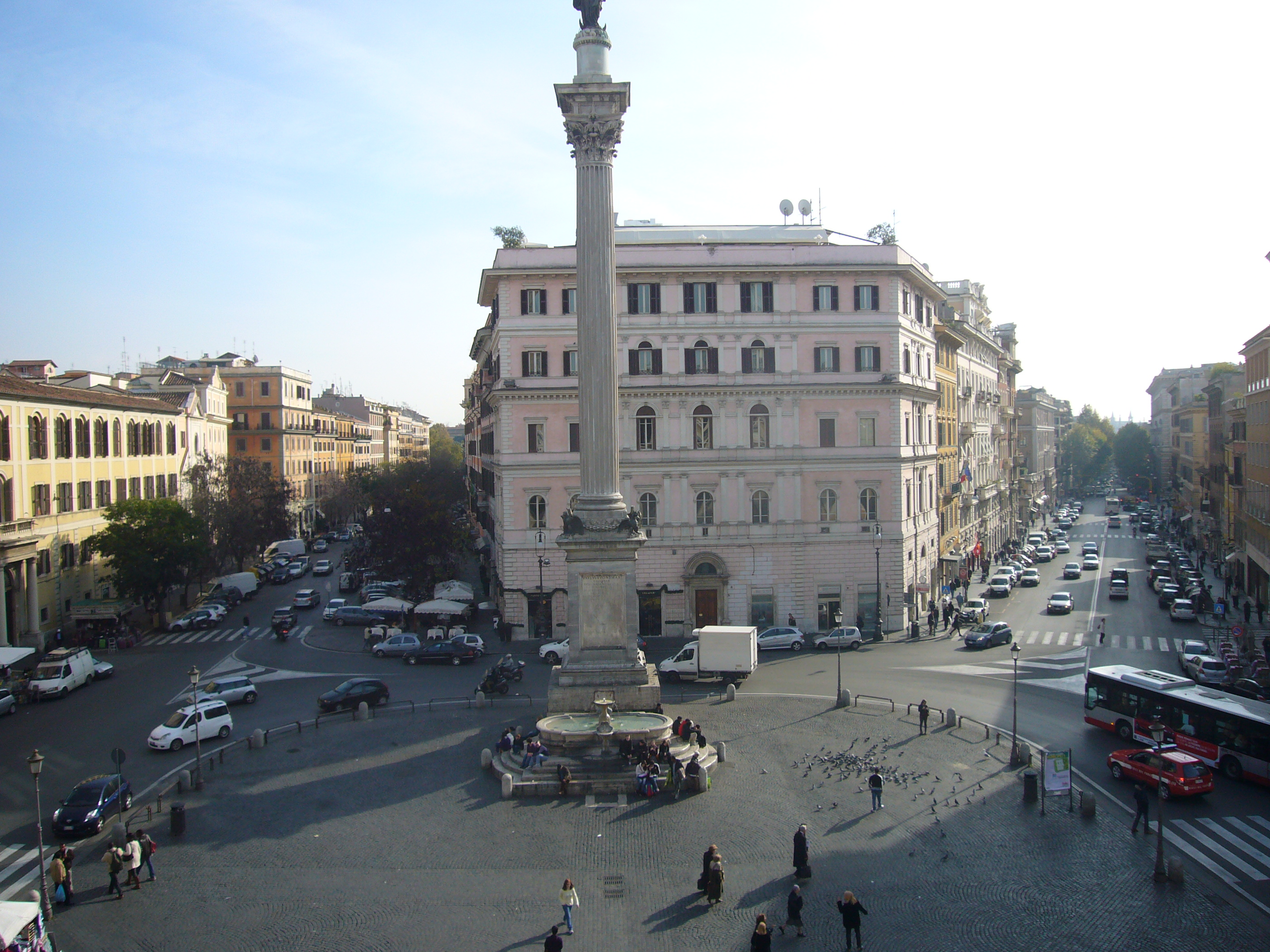 Roma, rione Esquilino dalla loggia di S. Maria Maggiore: a sinistra via Carlo Alberto, a destra via Merulana. In primo piano, la Colonna della Pace sulla piazza di S. Maria Maggiore.